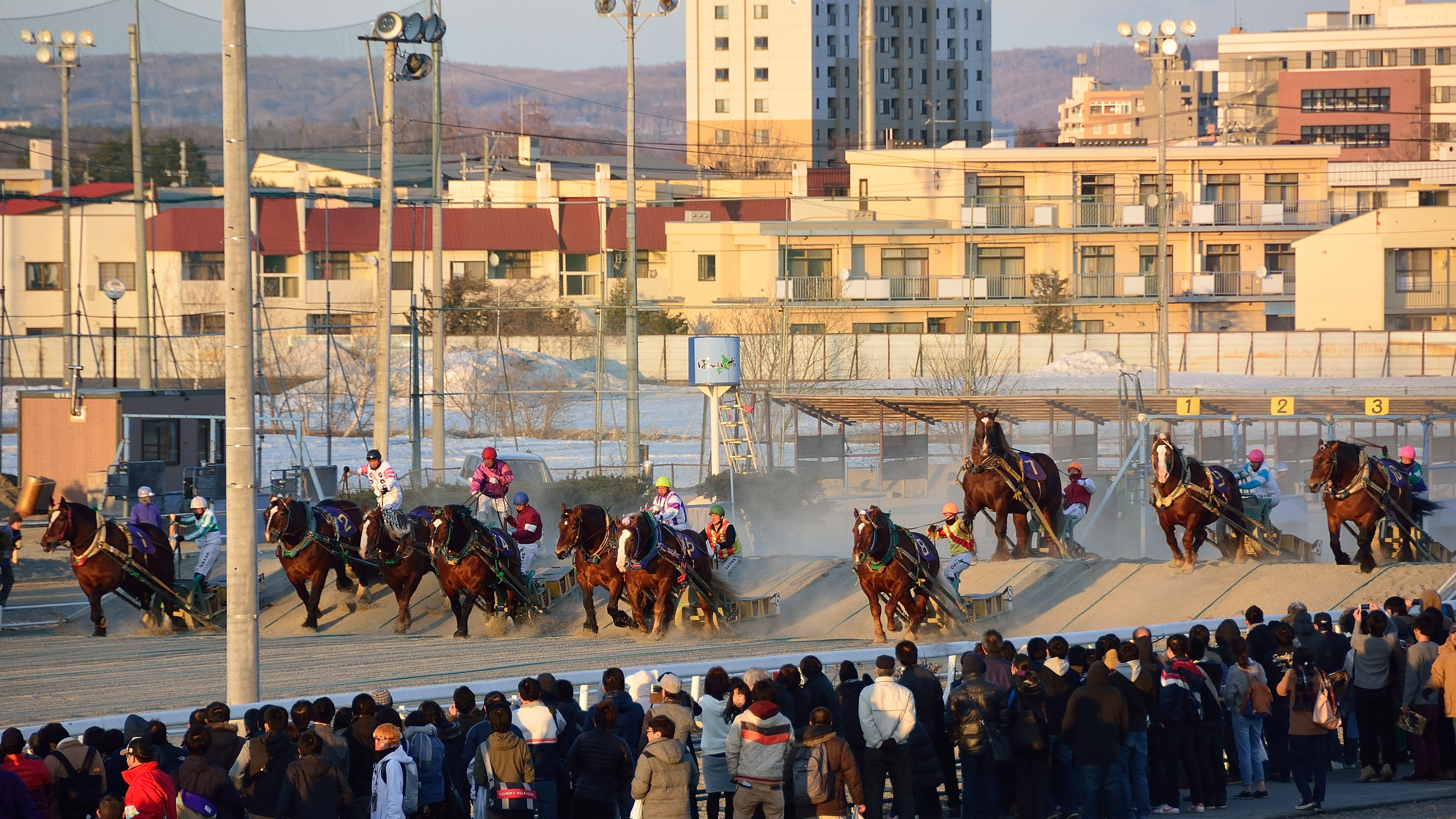 ばんえい記念の第1障害（2016年3月20日）